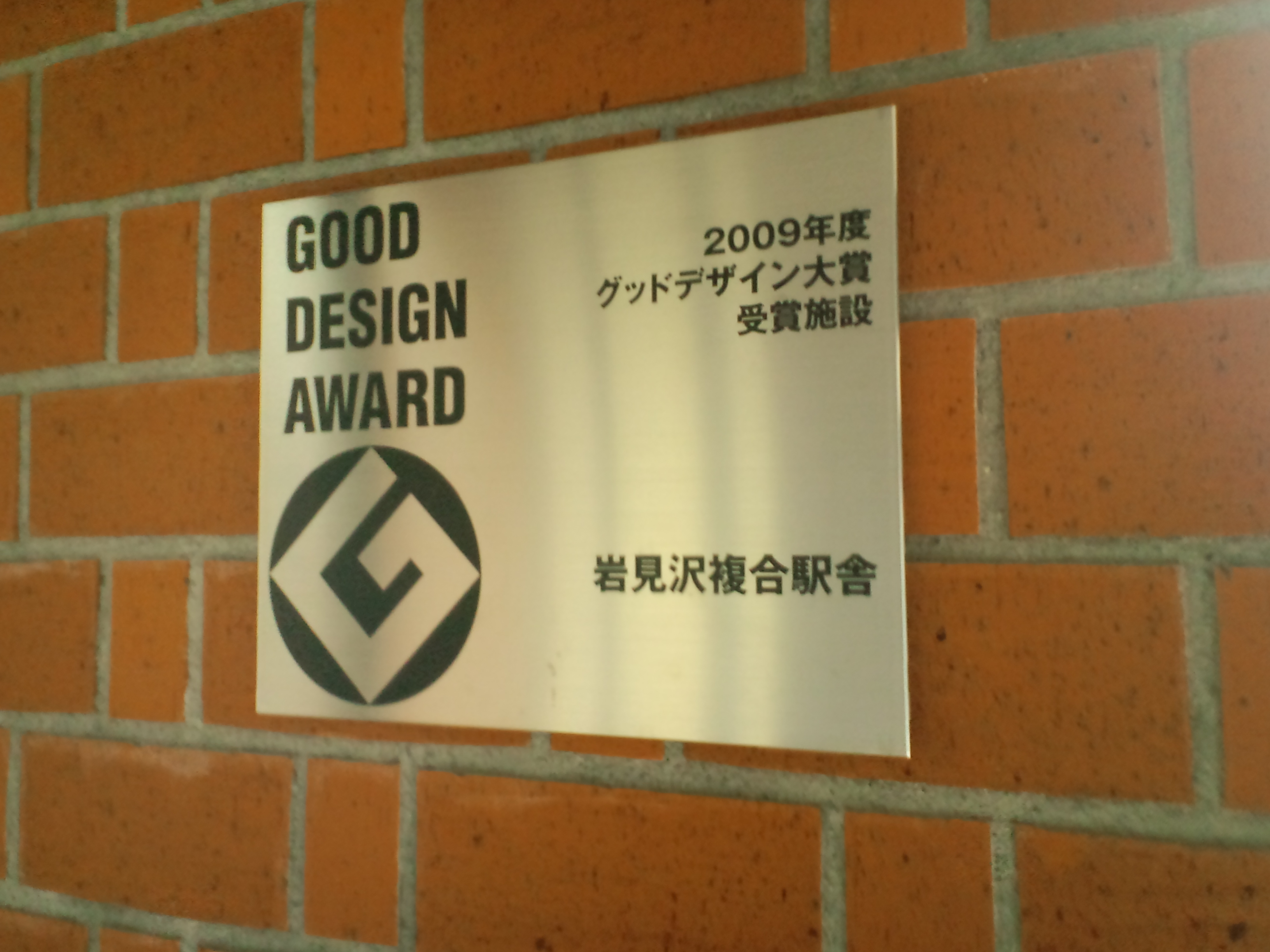 岩見沢複合駅舎のグッドデザイン大賞受賞記念プレート